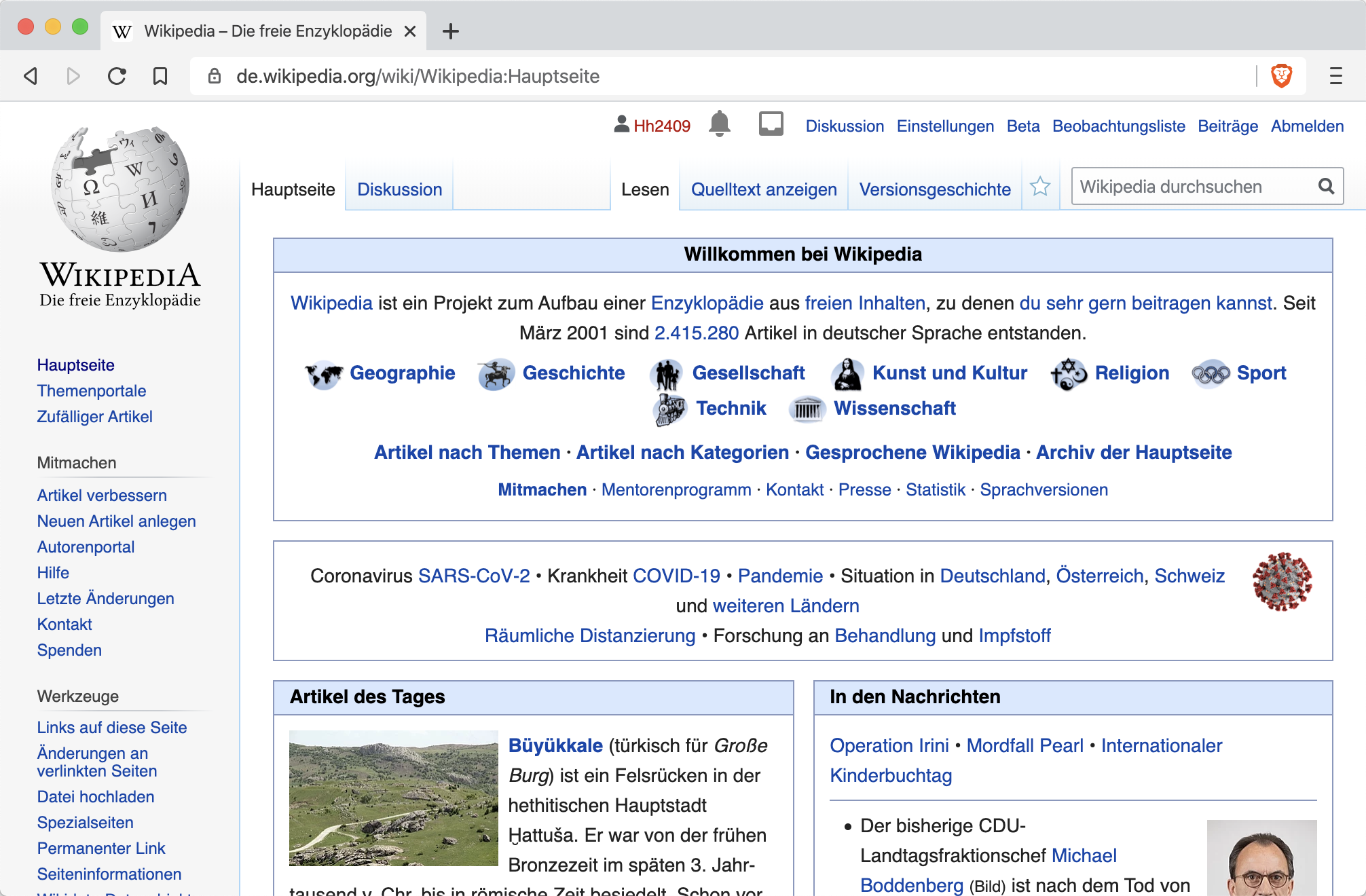 Der Browser Brave in Aktion